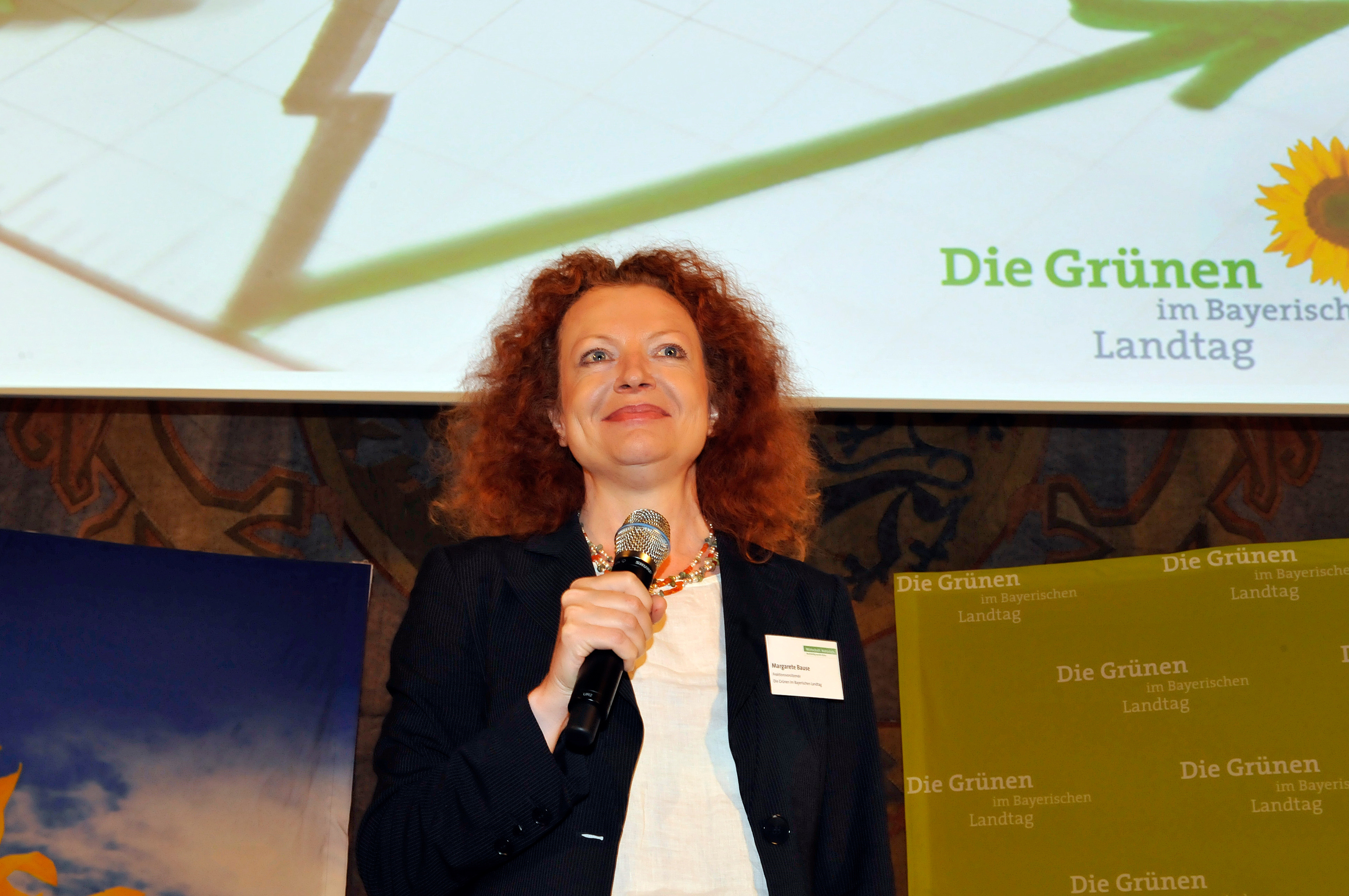 Margarete Bause Wirtschaft. Natürlich.